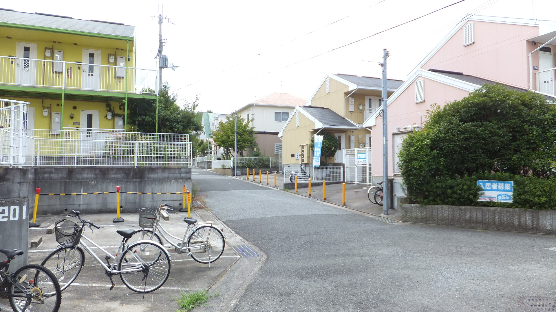 兵庫県三木市志染町青山3丁目 青山第3公園